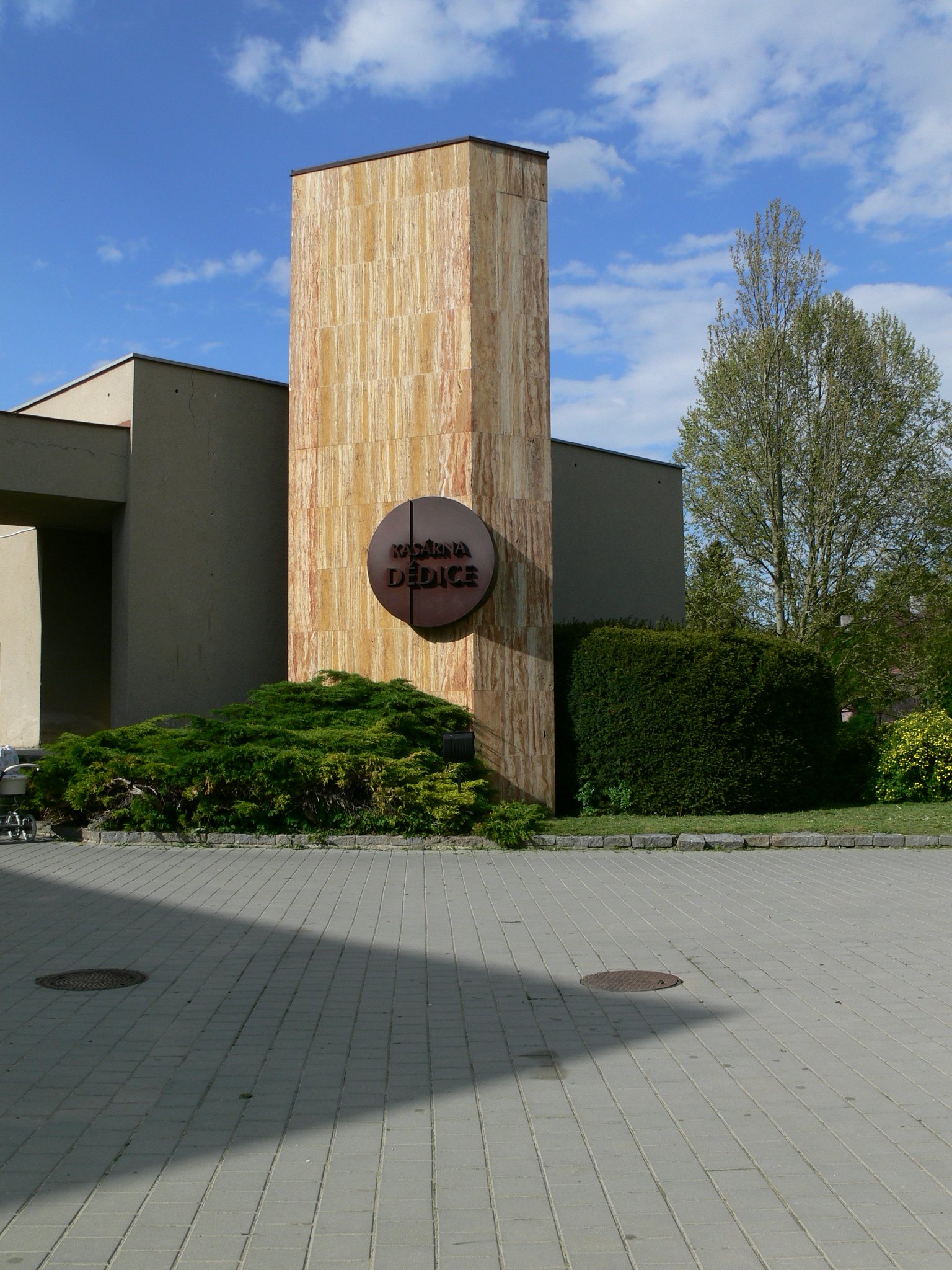 Dědice, areál vojenských škol, kasárna